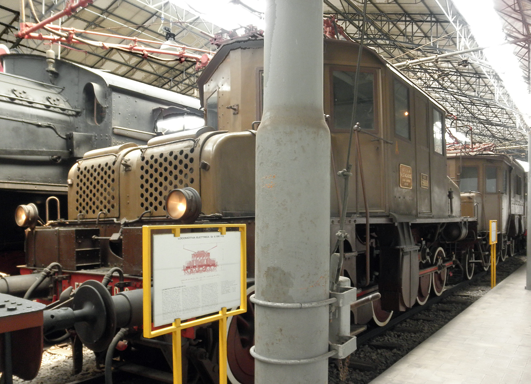 Locomotiva elettrica E.550 delle Ferrovie dello Stato conservata al Museo della Scienza e della Tecnologia di Milano.